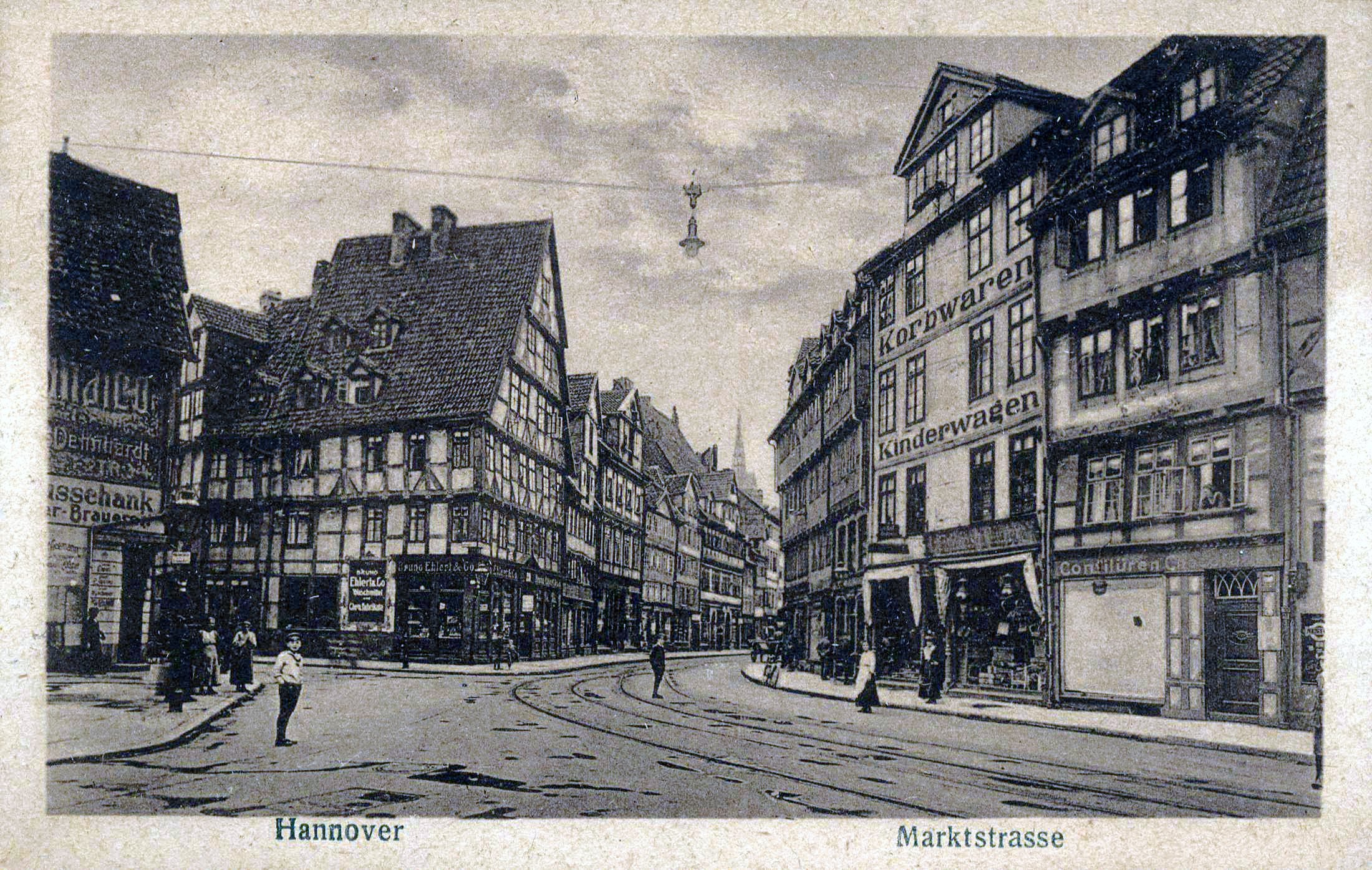 Blick von der (von links kommenden) Ebhardtstraße auf das Eckgebäude am Knappenort (heute die verlängerte Leinstraße) in die mit mittelalterlichen Fachwerkbauten bestandene Marktstraße in Richtung Marktkirche; etwa ab dem Eckgebäude mit der Firma Bruno Ehlert & Co., Waschmittel und Chem. Fabrikate" verläuft heute (Stand: 12/2012) der durch die Luftangriffe auf Hannover im Zweiten Weltkrieg "freigelegte" Parkplatz am Köbelinger Markt. Das Gelände soll durch im Zuge der innerstädtischen Umbaumaßnahmen Hannover City 2020 + teilweise überbaut werden ...